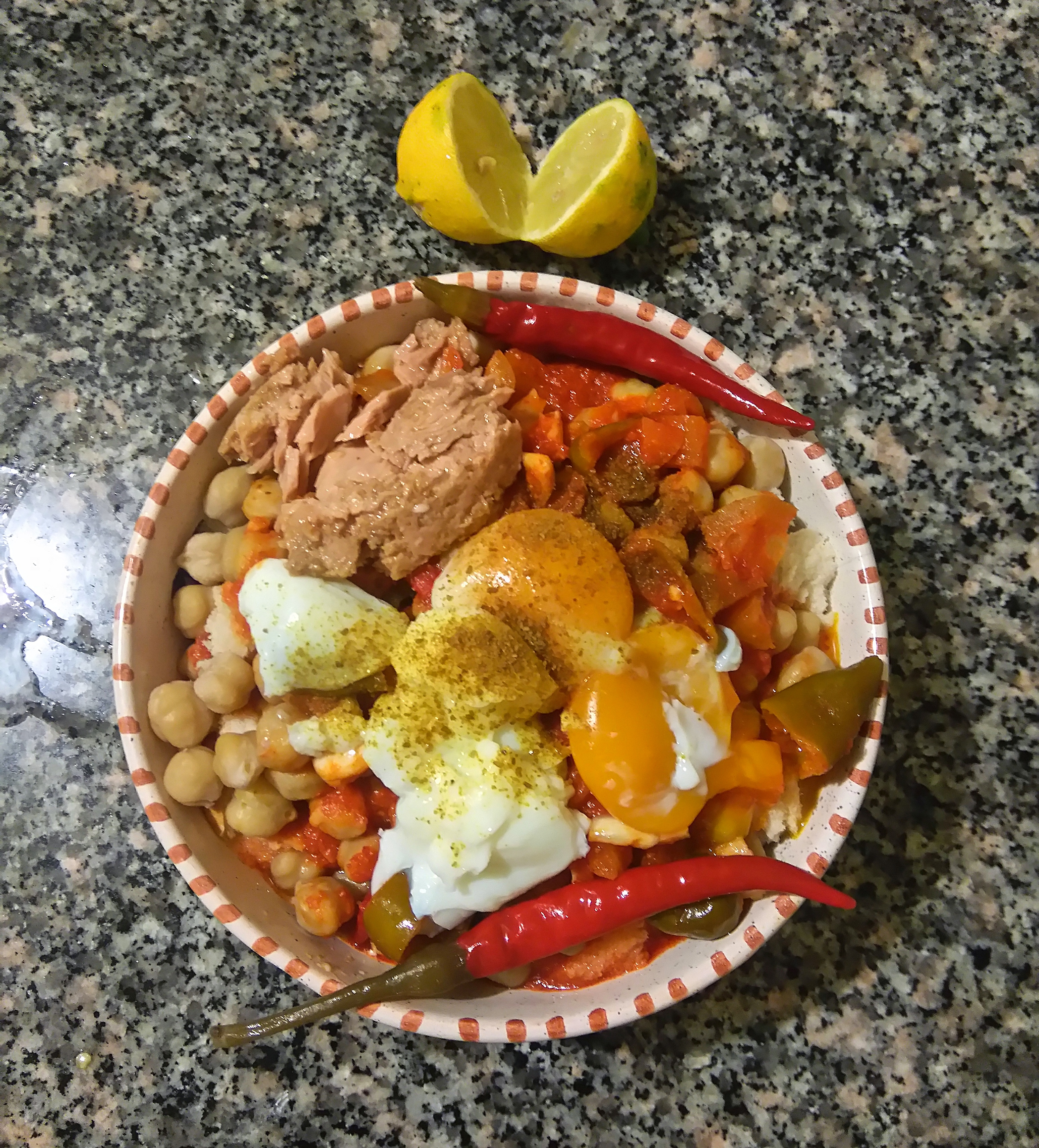 Leblabi, plat populaire tunisien servi dans un bol.